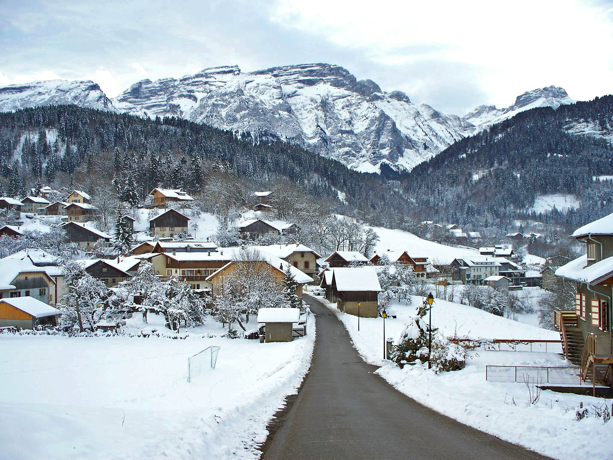 Mont Saxonnex et en arrière plan le massif du Bargy